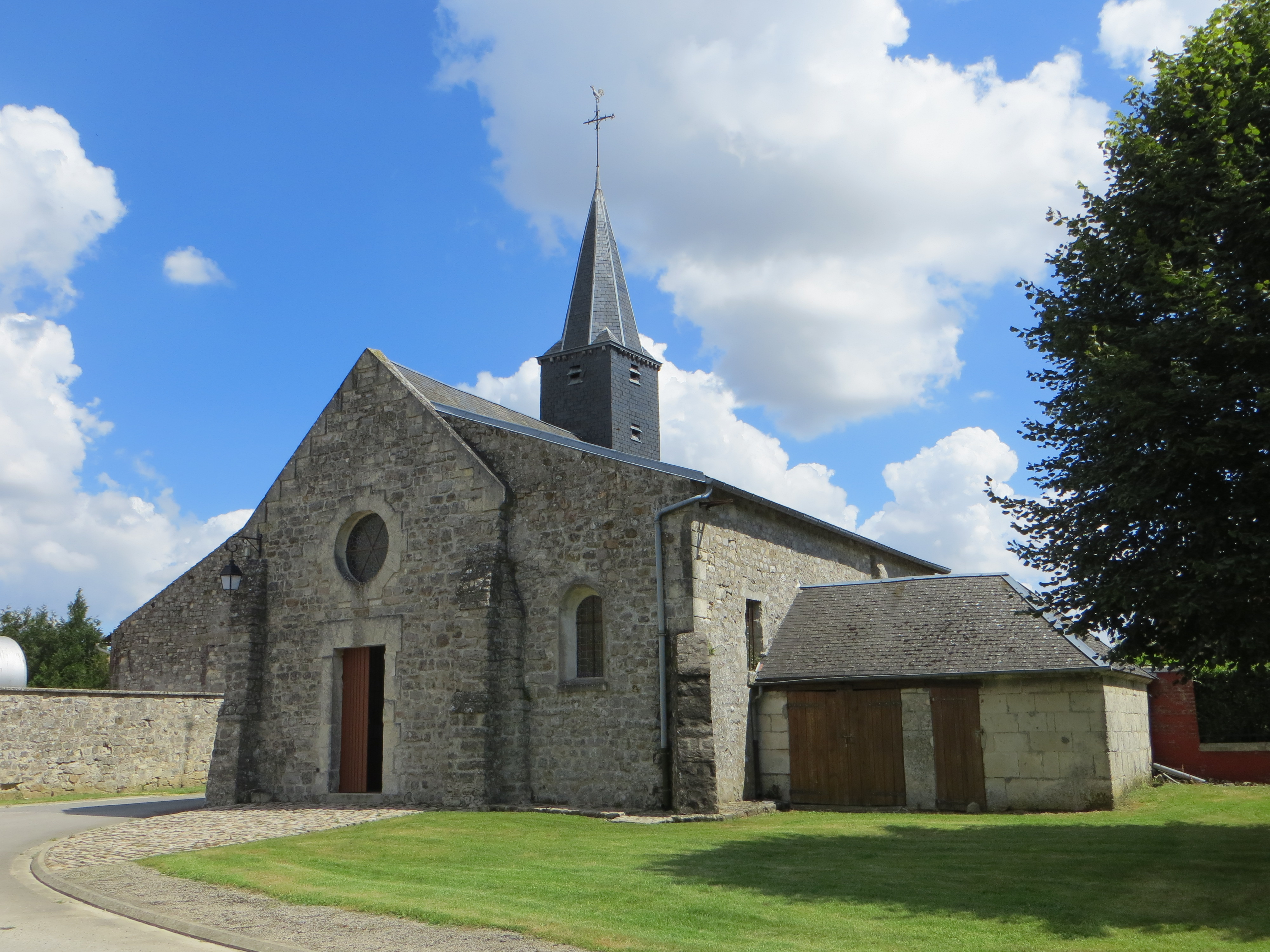 Vue générale de l'église